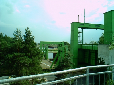 Schiffshebewerk Rothensee aufgenommen von Marian Szengel